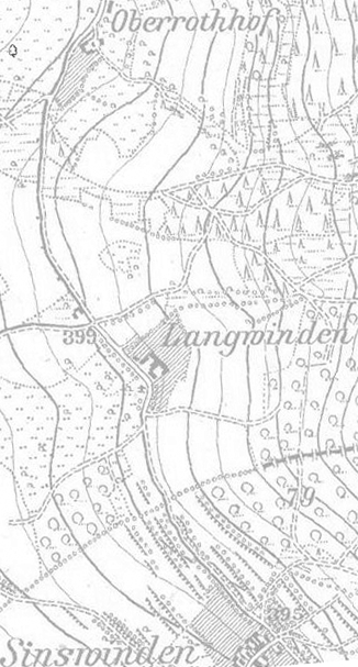 Kartenausschnitt der Umgebung der ehem. Höfe von Langwinden, Sinswinden und Oberrothhof in der Rhön.